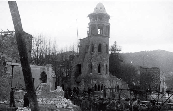 Fotografía de la Torre "La Miranda" de Llinars del Vallès tomada pocos días después del combate que tuvo lugar en esa localidad durante la Guerra Civil española. Las explosiones produjeron graves daños a muchos edificios, entre ellos esta construcción modernista, cuyo estado queda evidenciado en la imagen. El epígrafe rezaba: "Vista parcial del pueblo de Llinás, con la iglesia y edificios circunvecinos volados con dinamita por los rojos en su retirada."